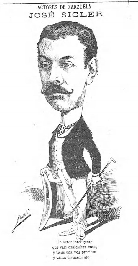 Caricatura de José Sigler, por «Mecachis»